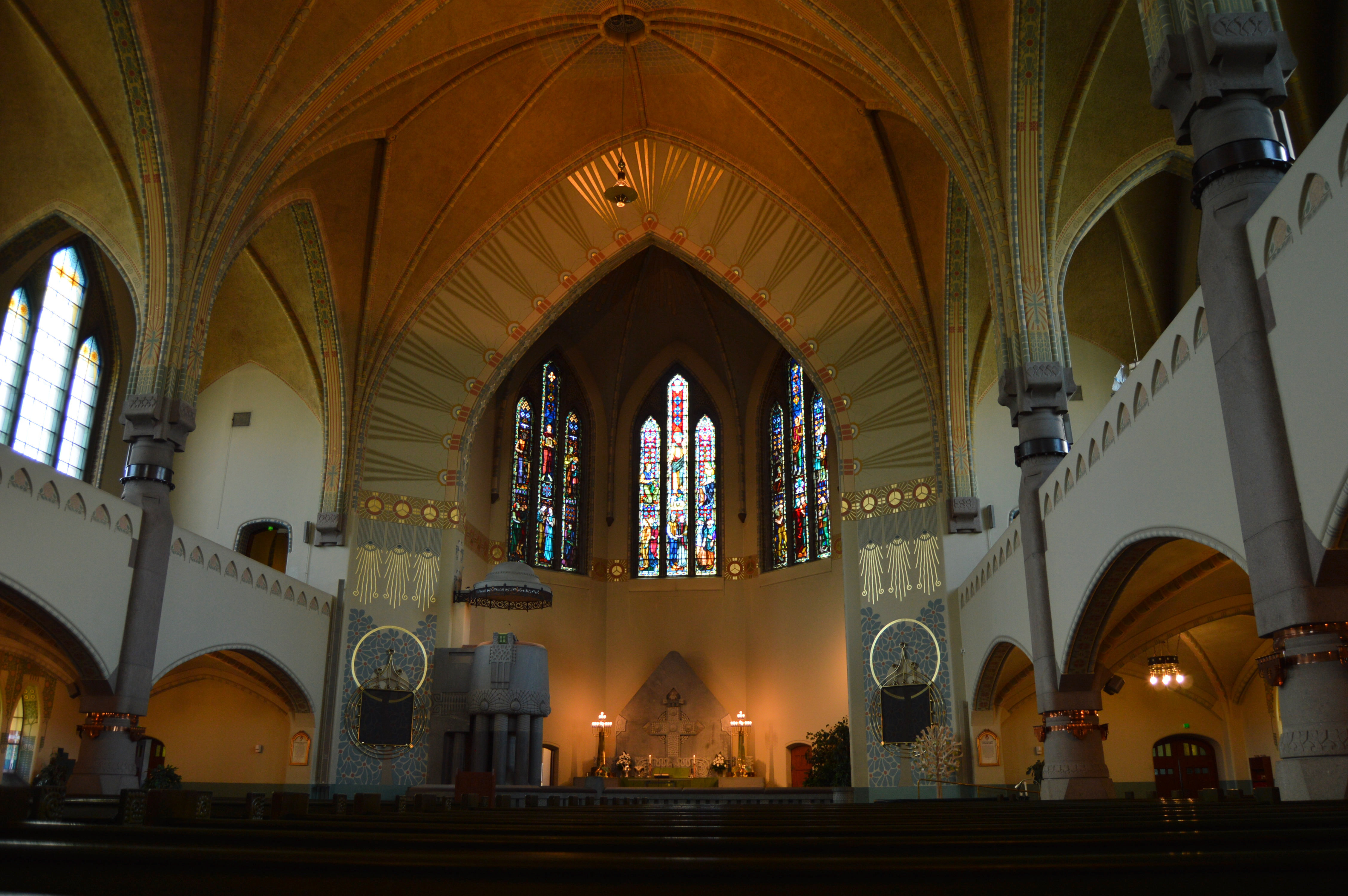 Turun Mikaelinkirkko sisältä